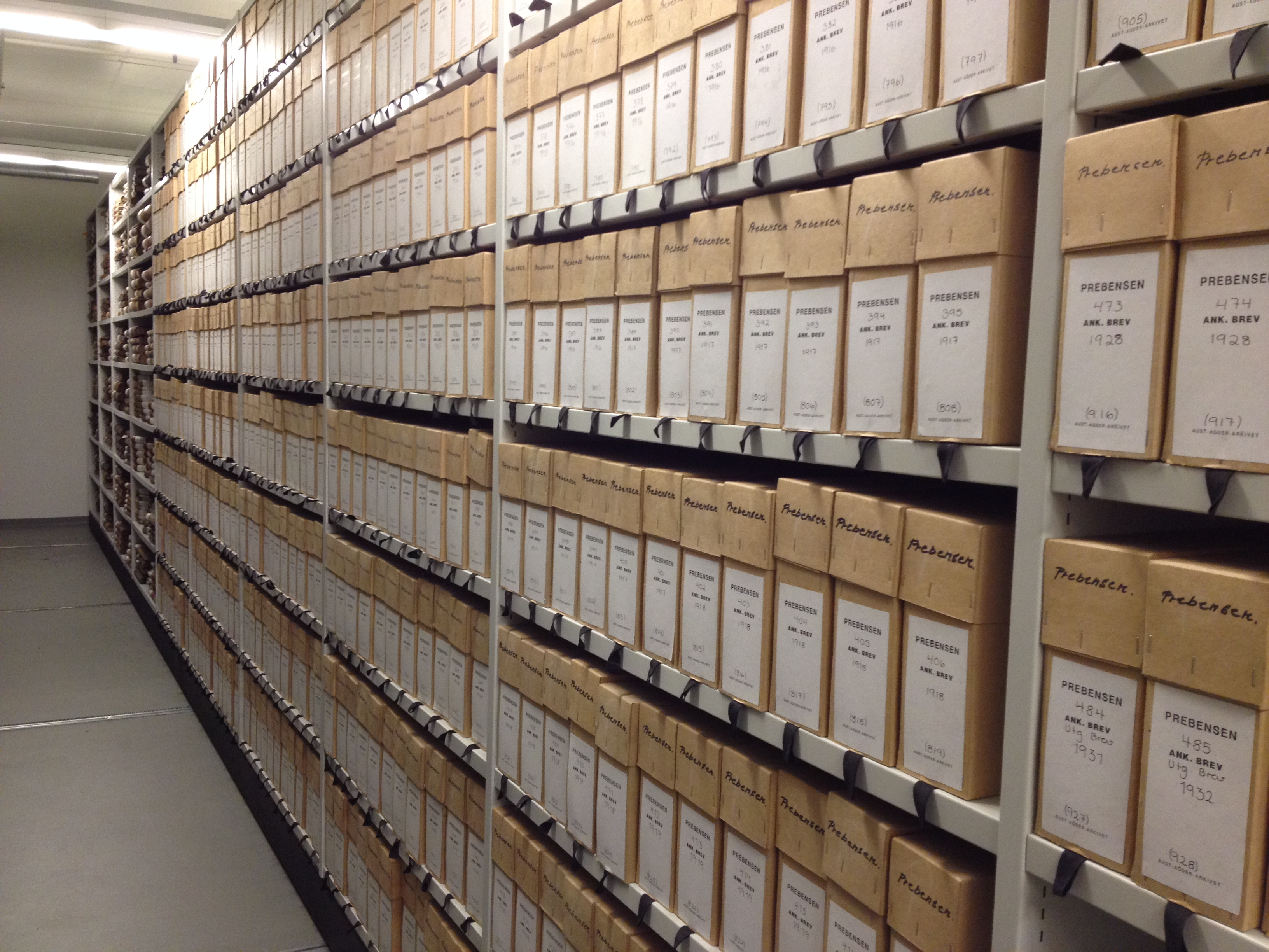 Arkivet etter Prebensens reder oppbevart ved KUBEN i Arendal